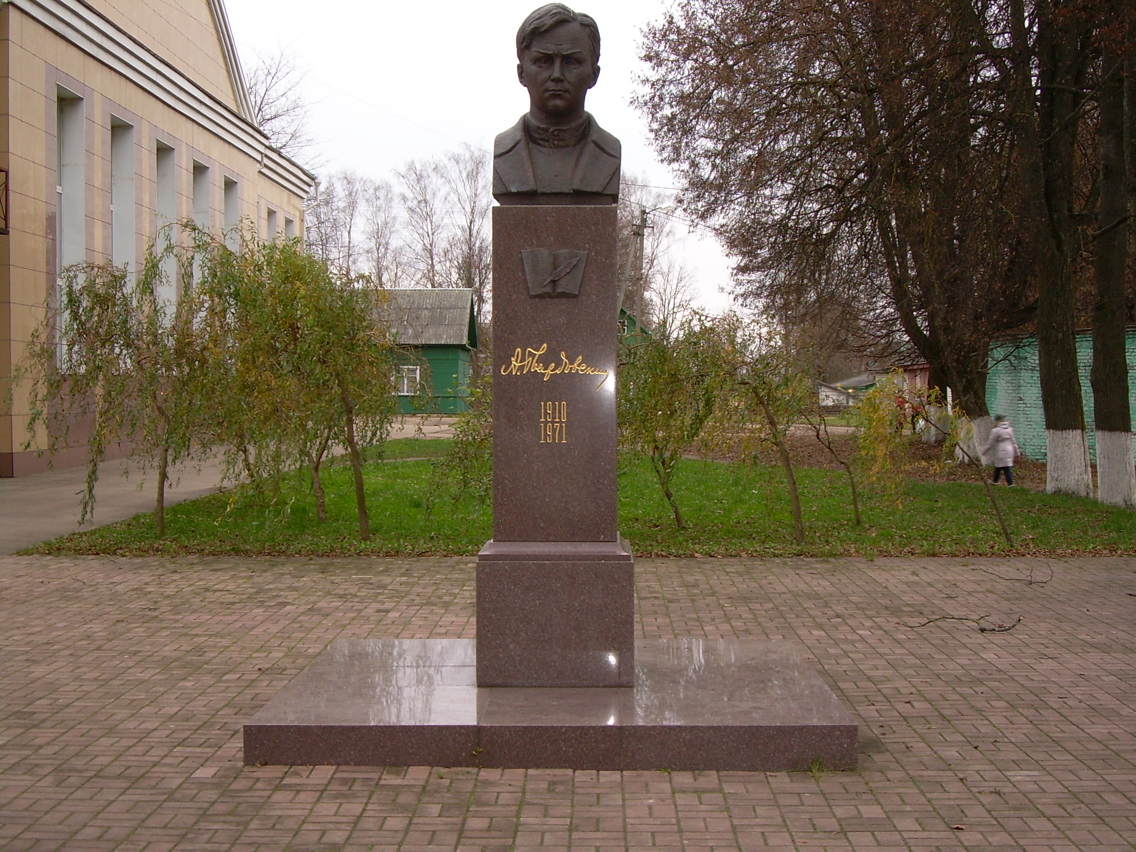 Бюст А. Т. Твардовского в городе Починок.